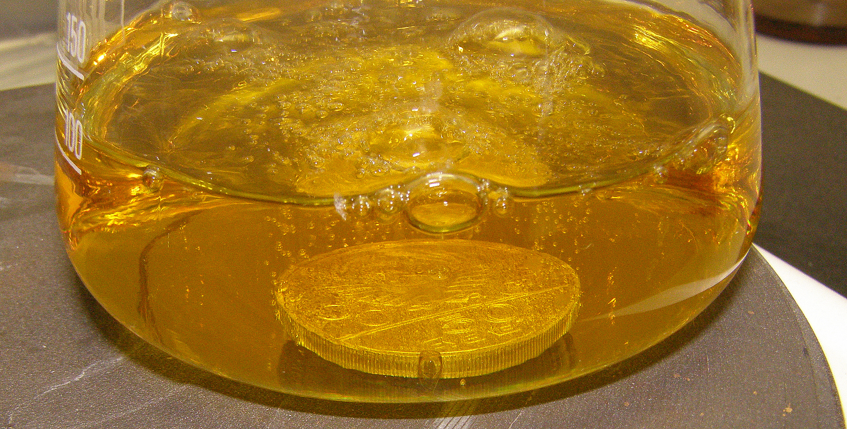 Plaatinamünt keevas kuningvees.